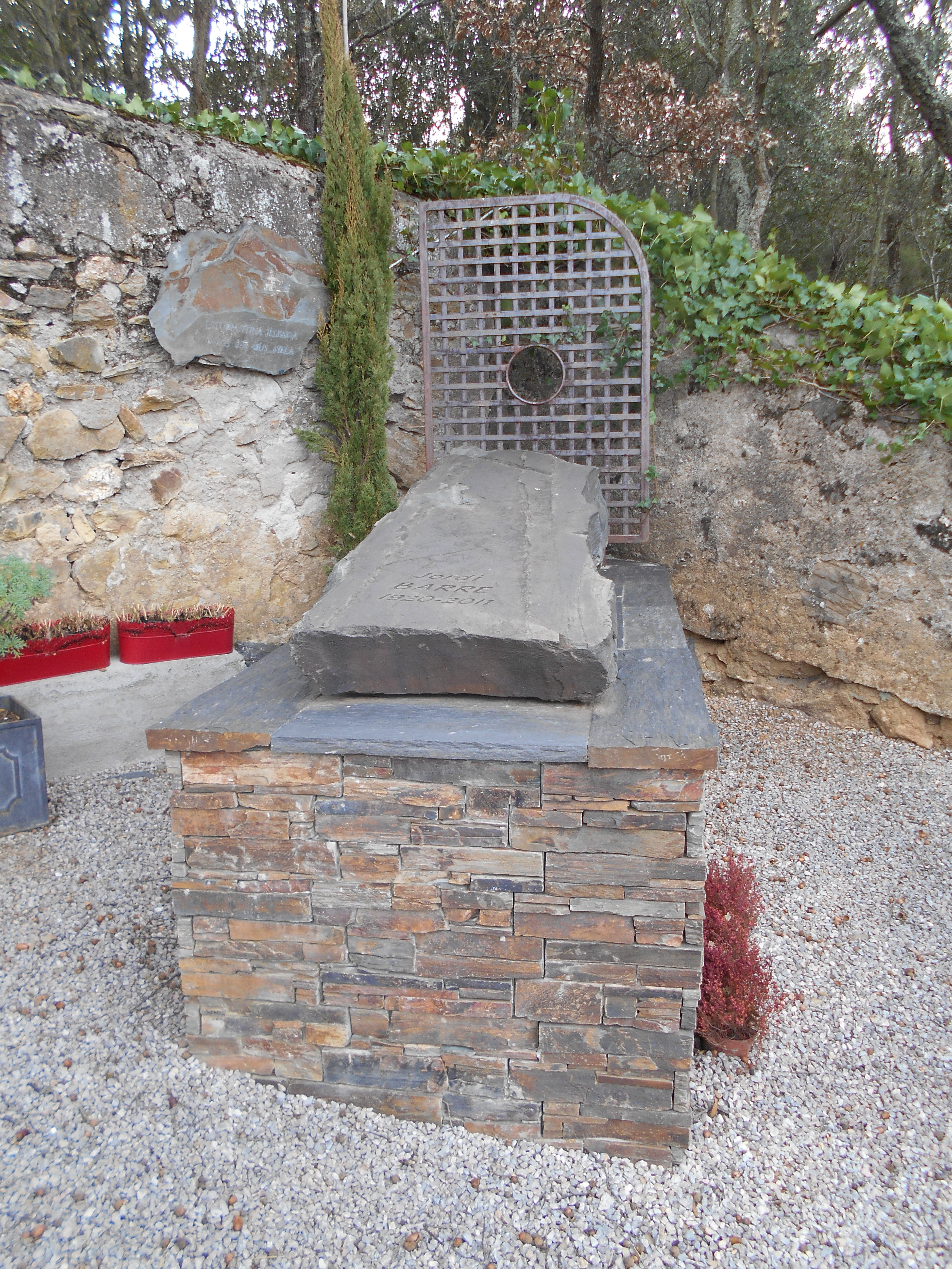 Tomba de Jordi Barre, al cementiri de Montoriol (els Aspres).